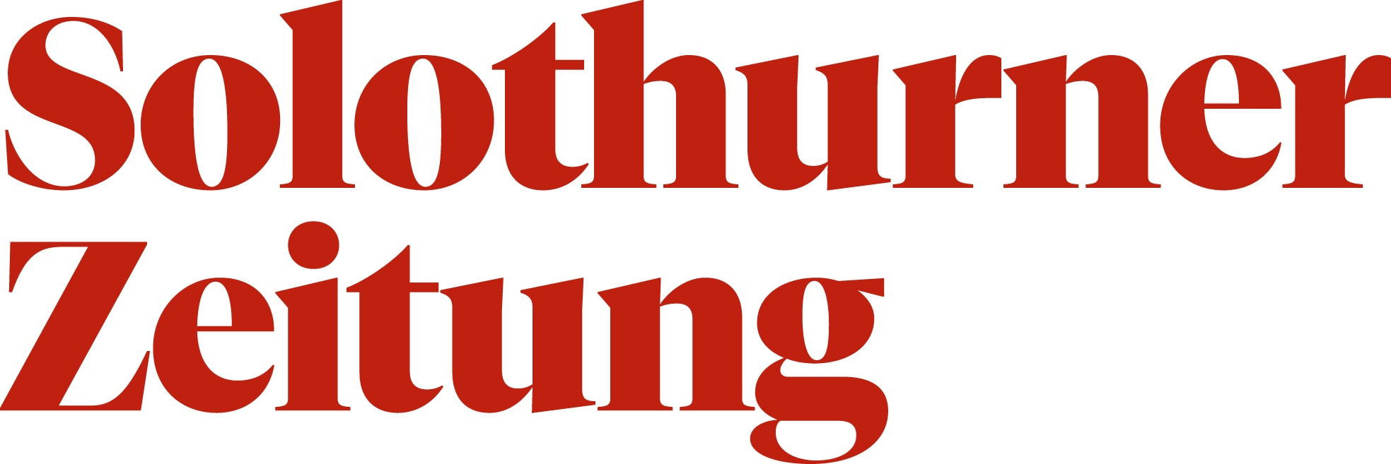 Logo der Solothurner Zeitung, eines der Kopfblätter der Nordwestschweiz